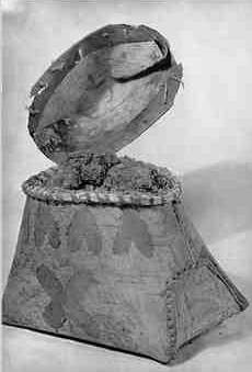 Sugar makak 1925